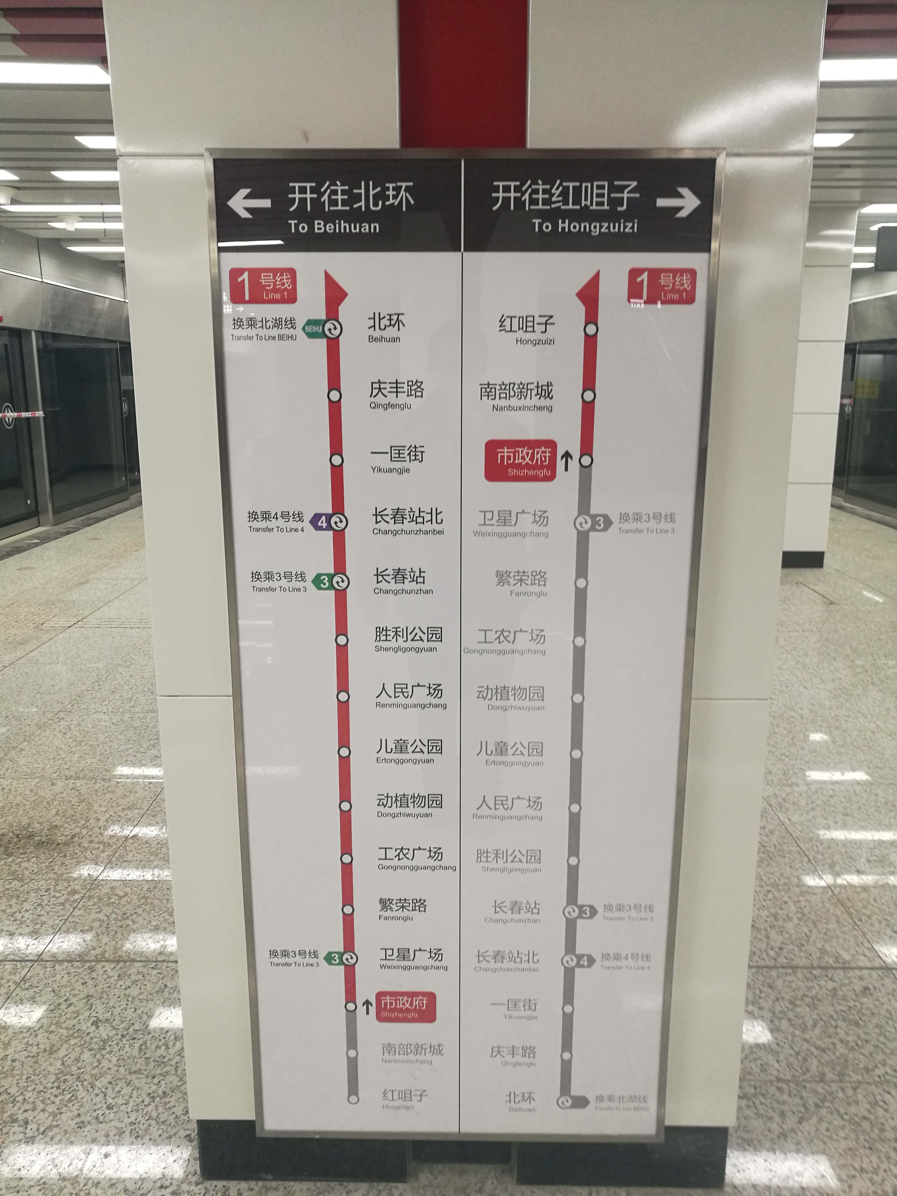 南环城路站线路指示牌